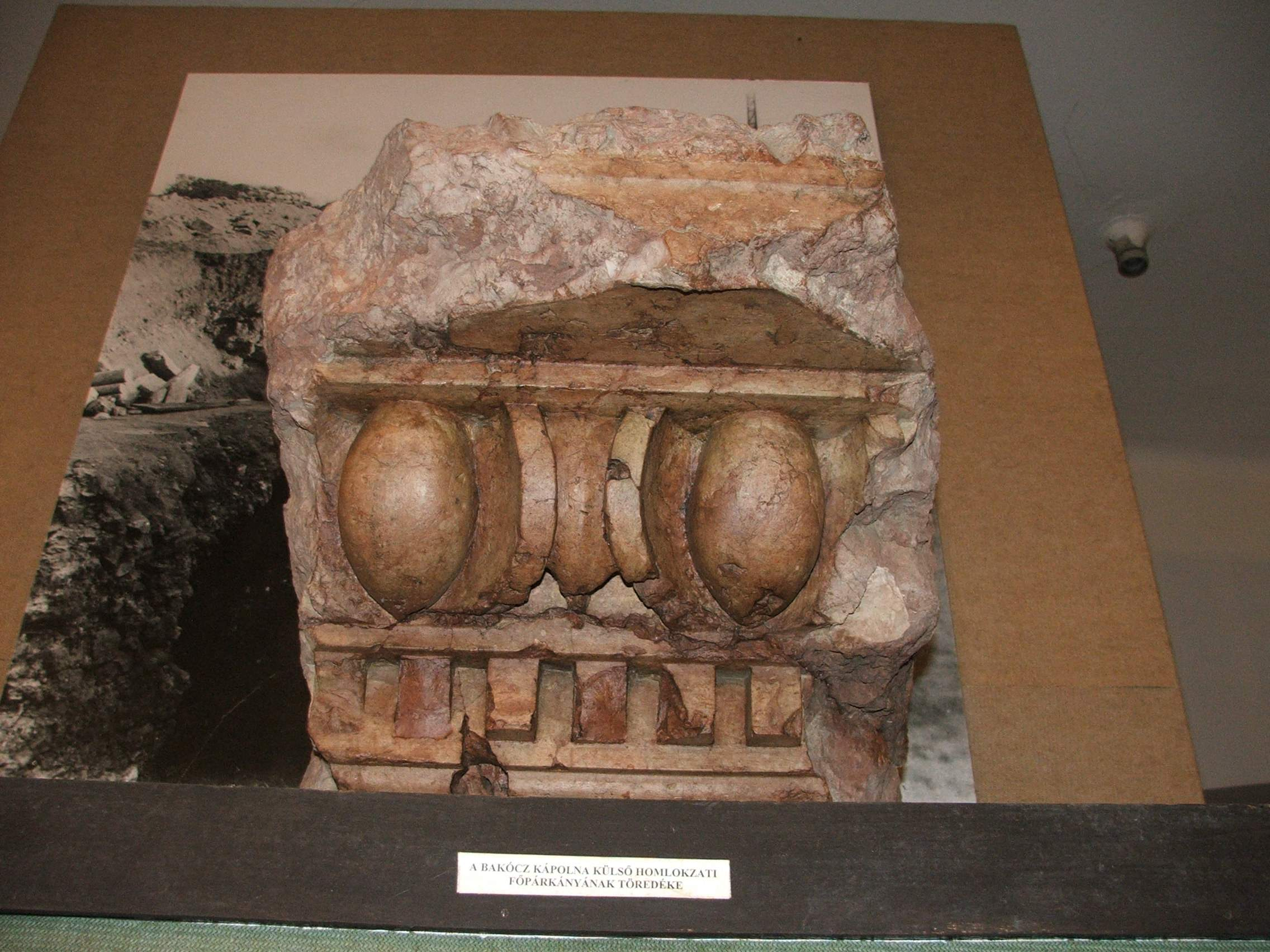 A Bakócz-kápolna egy töredéke, Esztergom, Balassa Múzeum